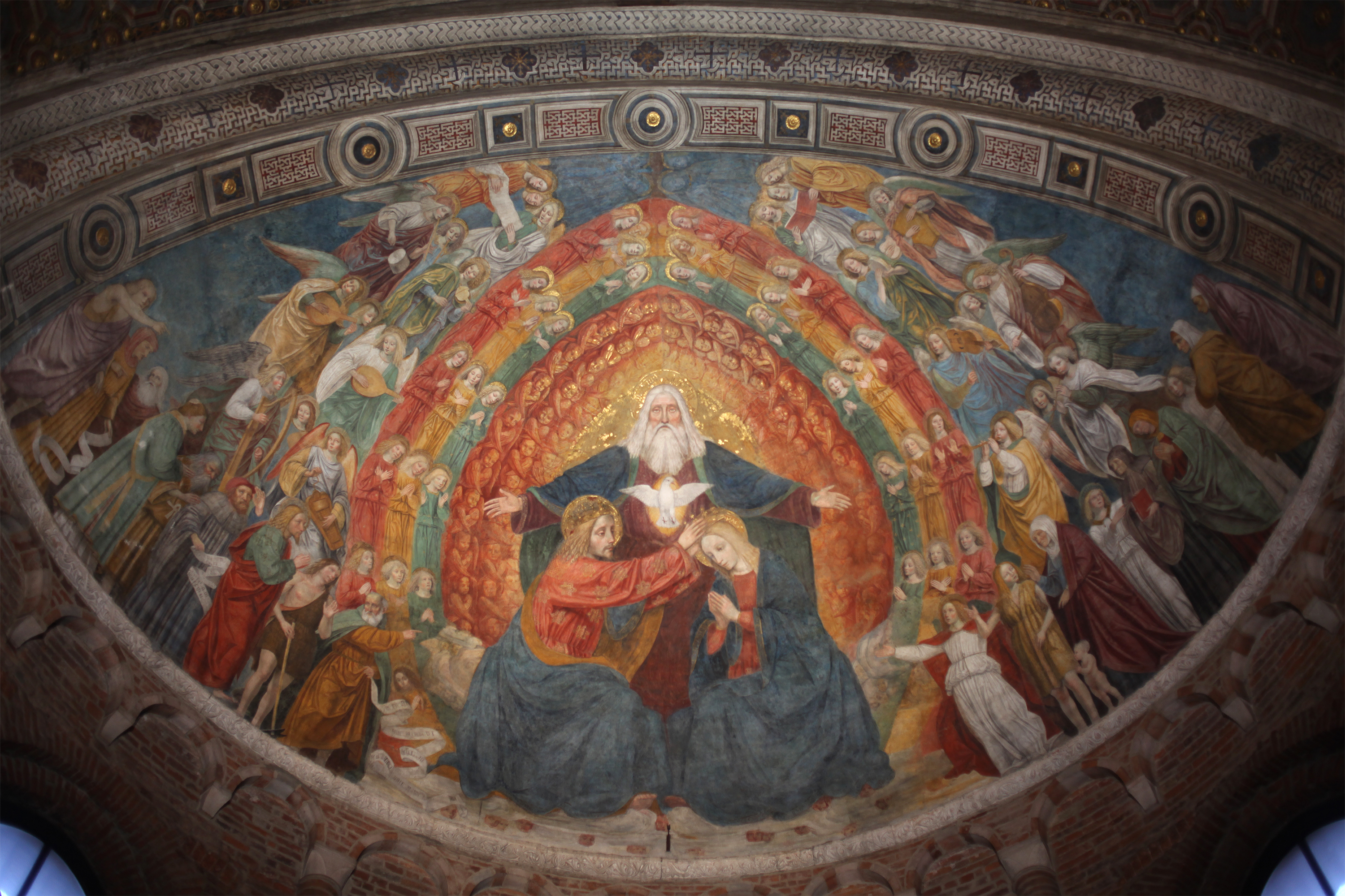 L'Incoronazione della Vergine del Bergognone, soffitto di San Simpliciano, Milano